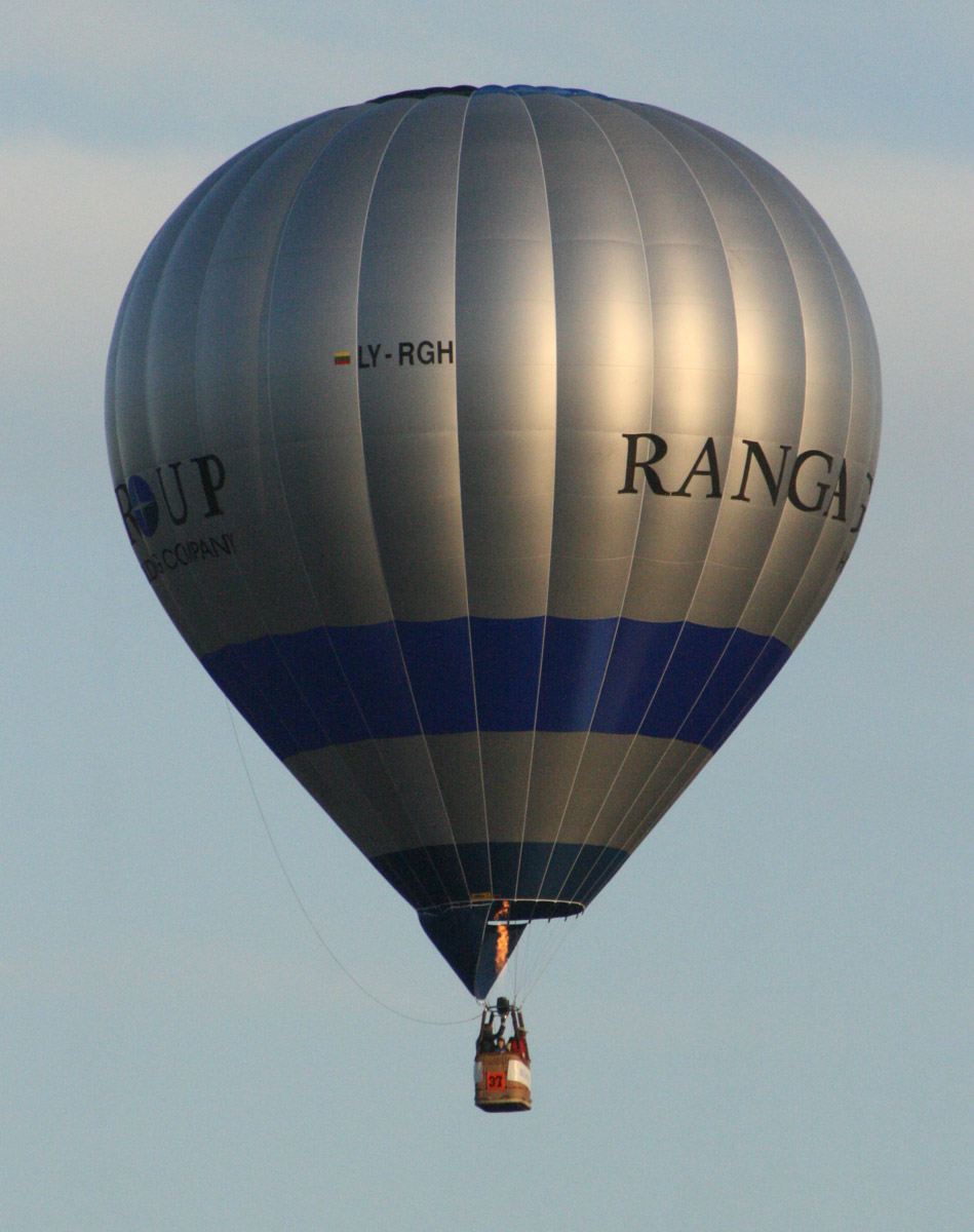 Hot air baloon (Lithuania, Ranga group, LY-RGH) May 26, 2007. Vilnius)